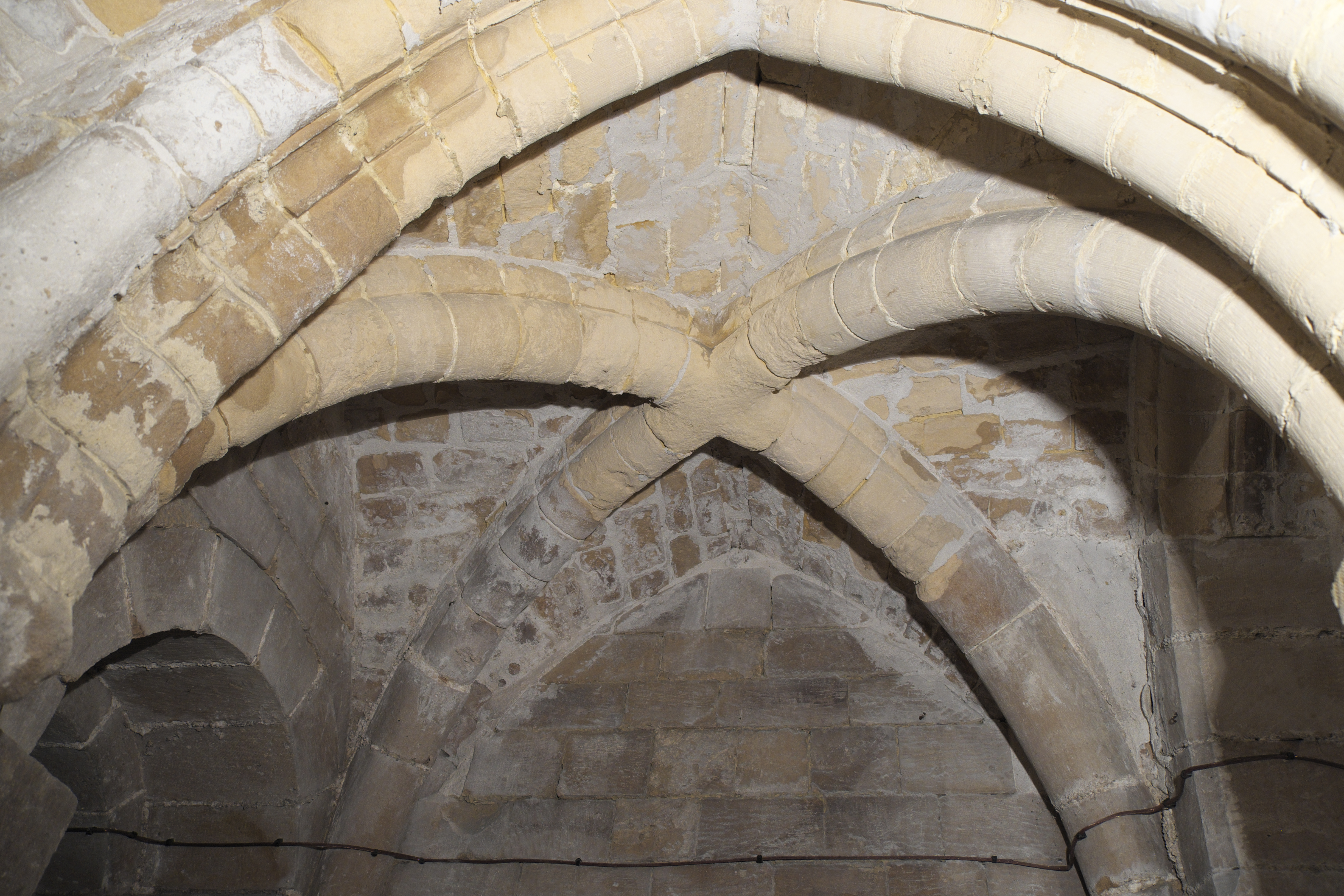 Katholische Pfarrkirche Saint-Martin in Cormeilles-en-Parisis im Département Val-d’Oise (Île-de-France/Frankreich), gotische Krypta